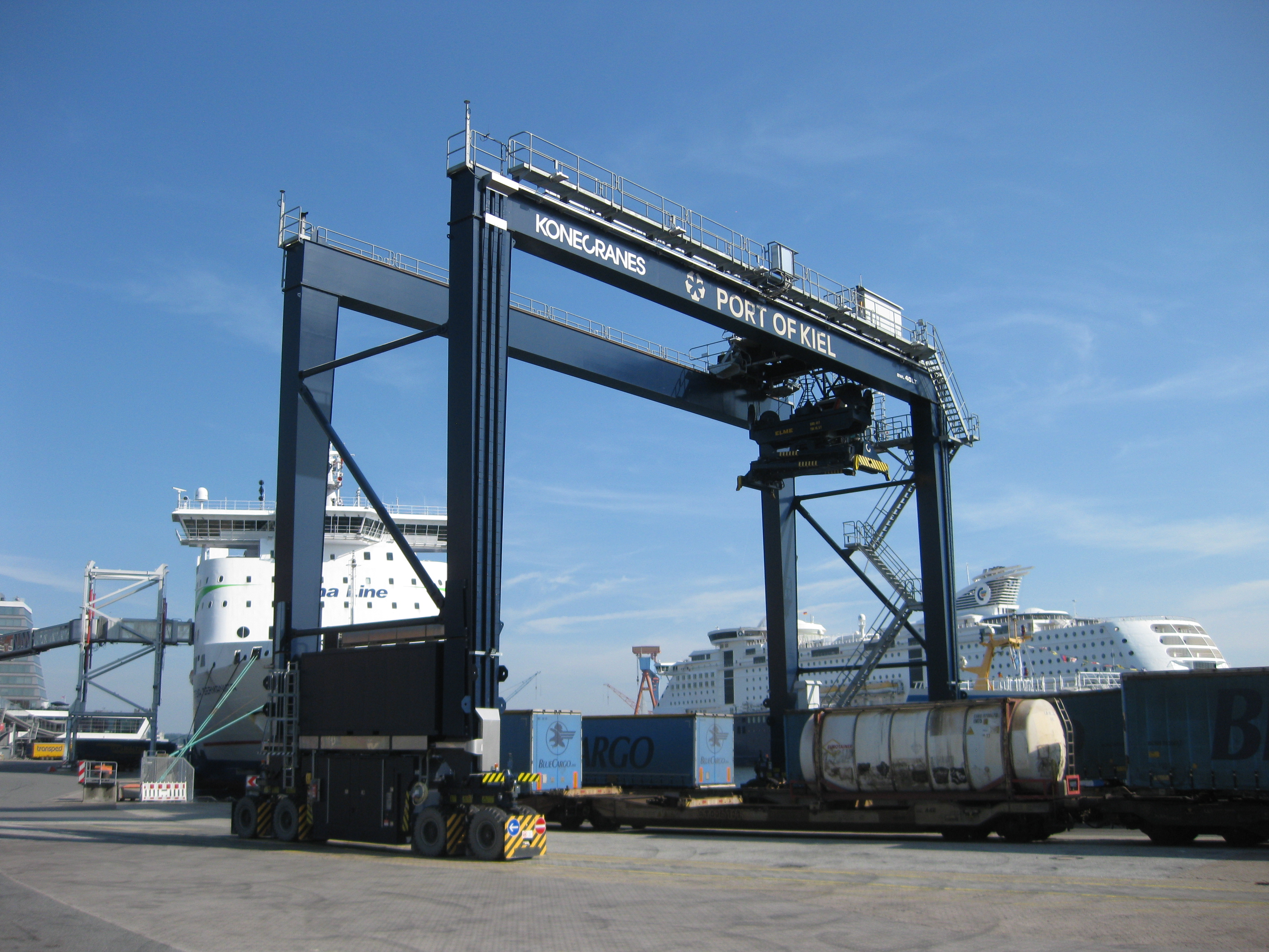 Konecranes Container-Kran, Port of Kiel